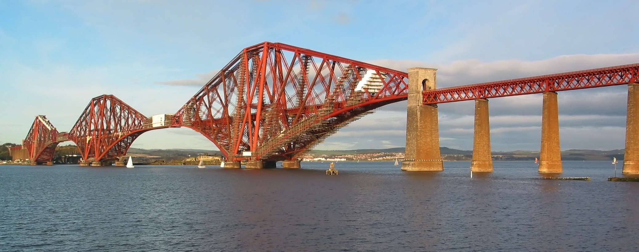 A Forth vasúti híd a Firth of Forth felett Skóciában. Az eredeti kép kivágata egy kis szerkesztés (színkezelés, zajszűrés) után (by Samat)